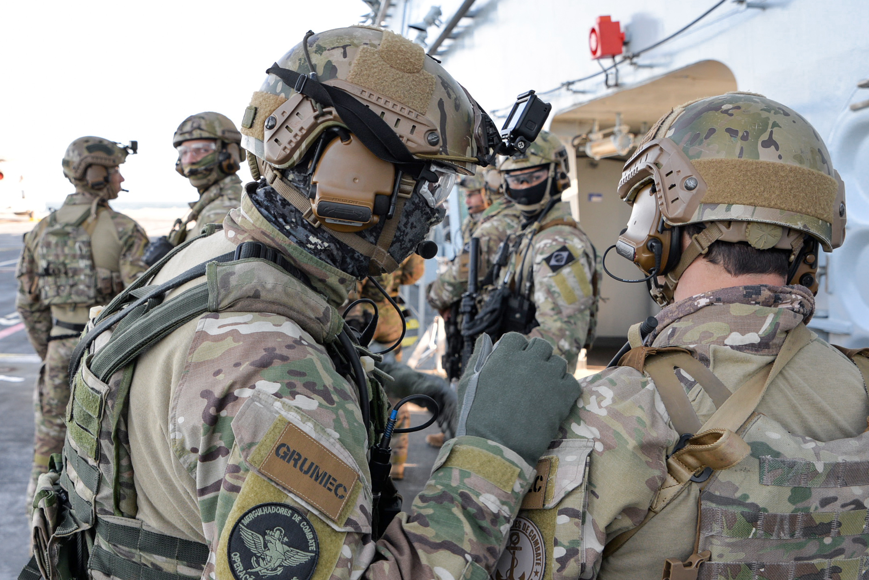 Mergulhadores de Combate se preparando para treinamento. Arquivo liberado pela Marinha do Brasil através de projeto GLAM com Wiki Educação Brasil